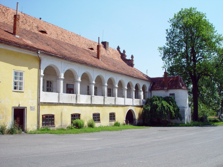 Mokrosuky 8-6-2007